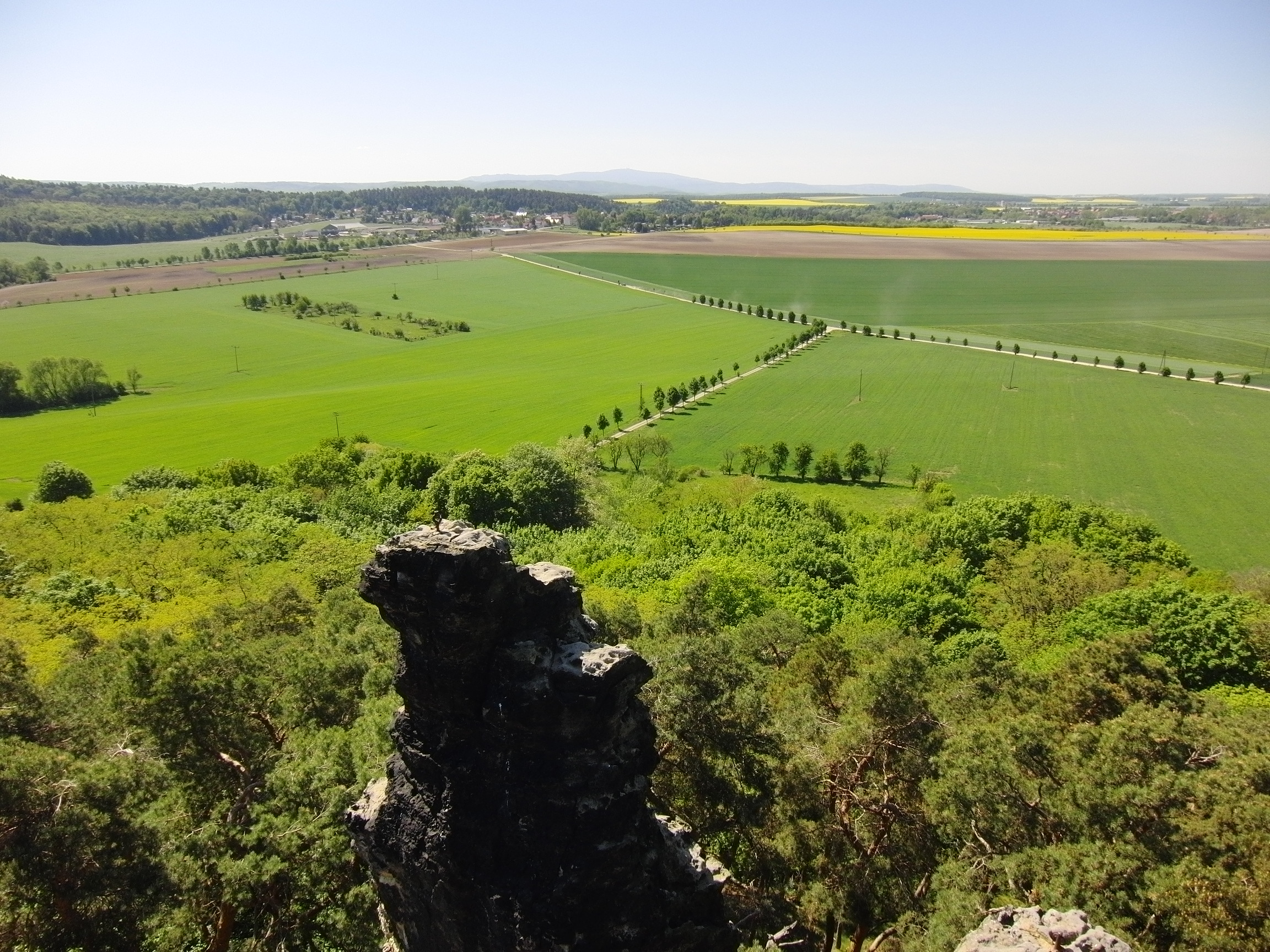 Blick vom Gläsernen Mönch Richtung Langenstein